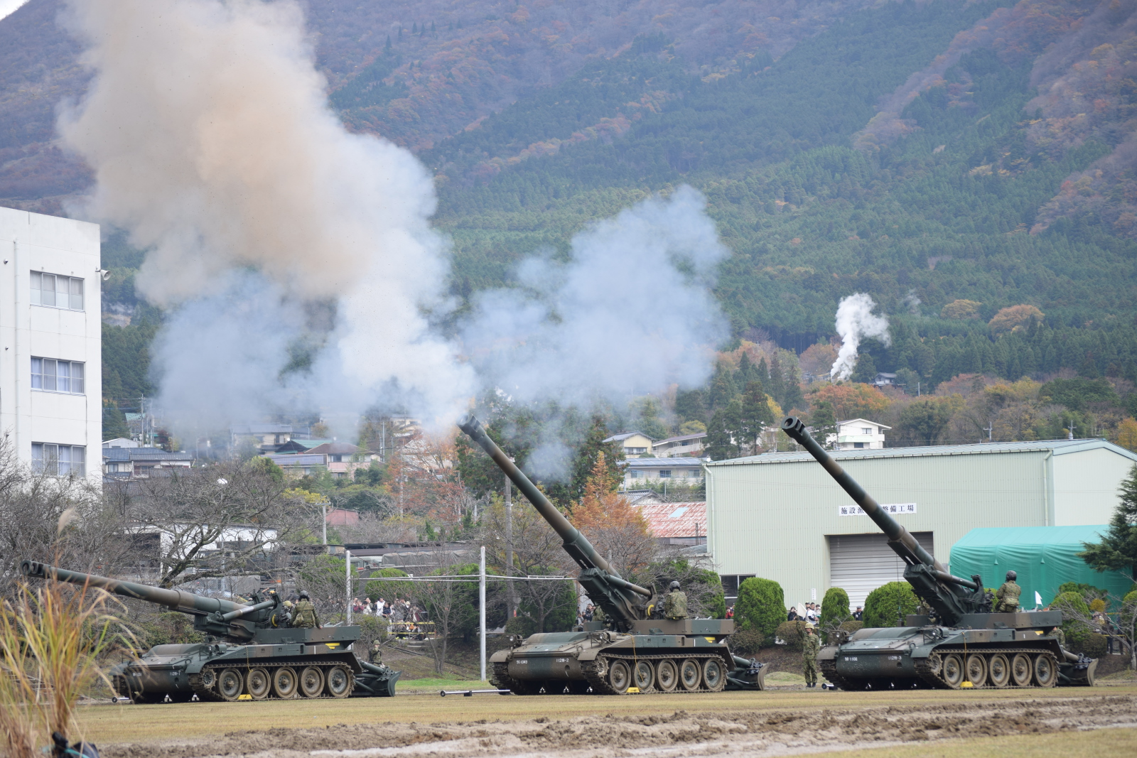 西部方面特科隊（湯布院駐屯地）の203mm自走榴弾砲の空砲射撃。「湯布院駐屯地開設59周年・西部方面特科隊創隊13周年記念行事」の訓練展示にて。